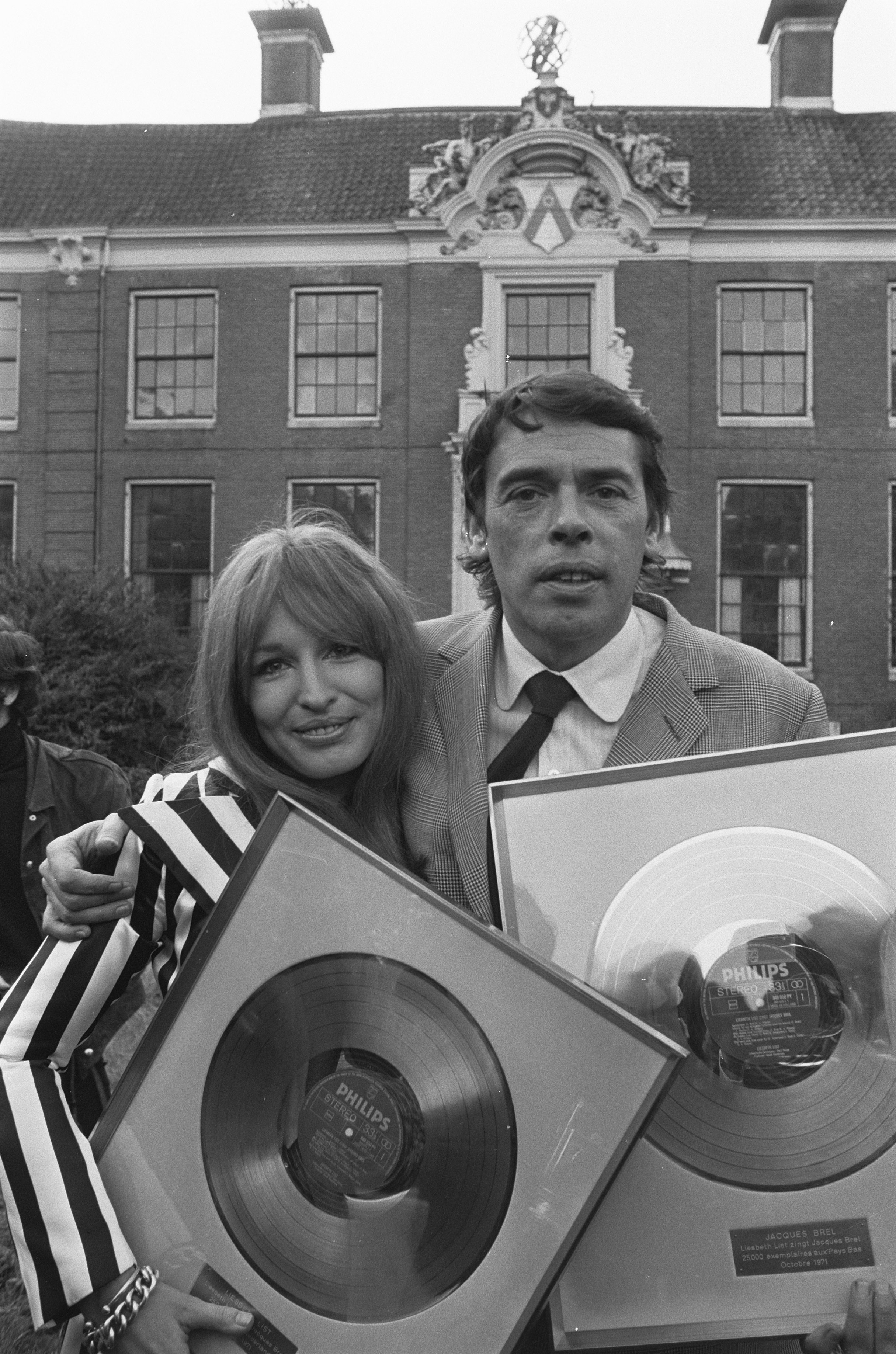 Collectie / Archief : Fotocollectie Anefo Reportage / Serie : [ onbekend ] Beschrijving : Liesbeth List krijgt gouden LP voor "LL zingt J. Brel" op kasteel Groeneveld te Baarn: Liesbeth List en Jacques Brel Datum : 26 oktober 1971 Locatie : Baarn Trefwoorden : grammofoonplaten, muziek, prijzen, zangeressen, zangers Persoonsnaam : Brel, Jacques, List, Liesbeth Fotograaf : Mieremet, Rob / Anefo Auteursrechthebbende : Nationaal Archief Materiaalsoort : Negatief (zwart/wit) Nummer archiefinventaris : bekijk toegang 2.24.01.05 Bestanddeelnummer : 925-0798